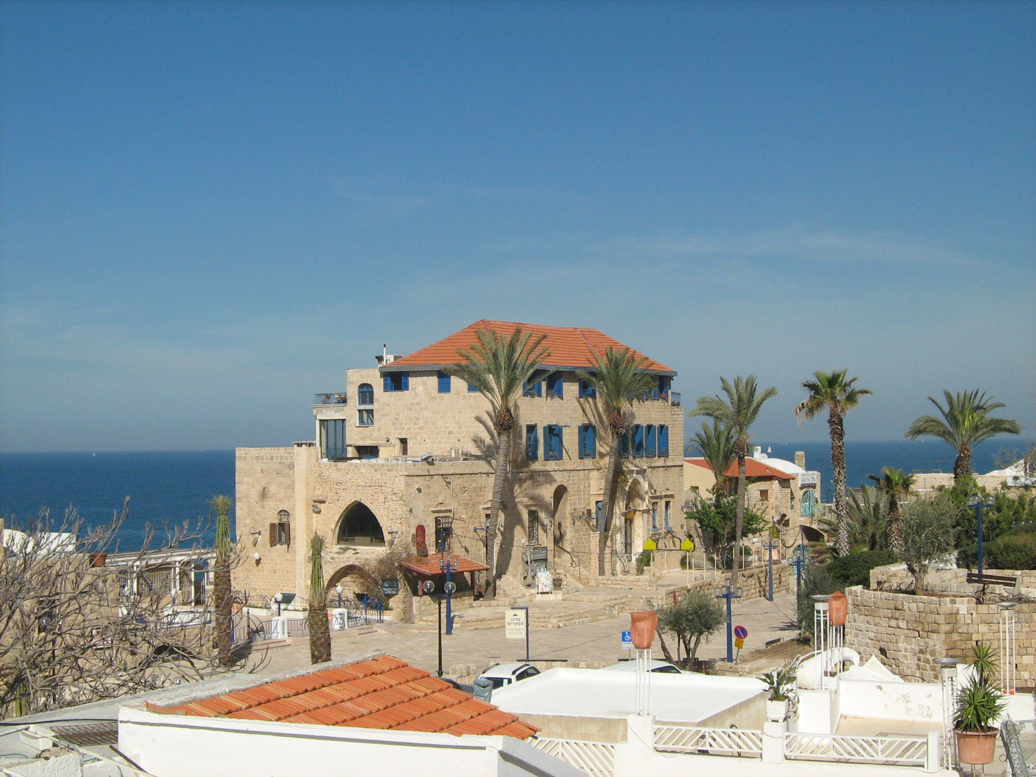 יפו